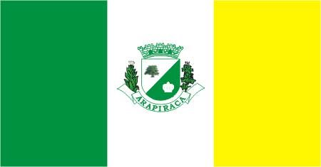 This image shows a flag, a coat of arms, a seal or some other official insignia. The use of such symbols is restricted in many countries. These restrictions are independent of the copyright status.